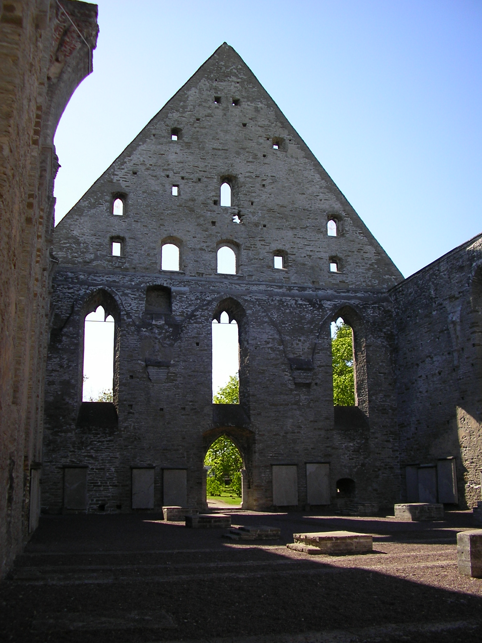 Ruinen des St. Brigittenklosters in Tallinn